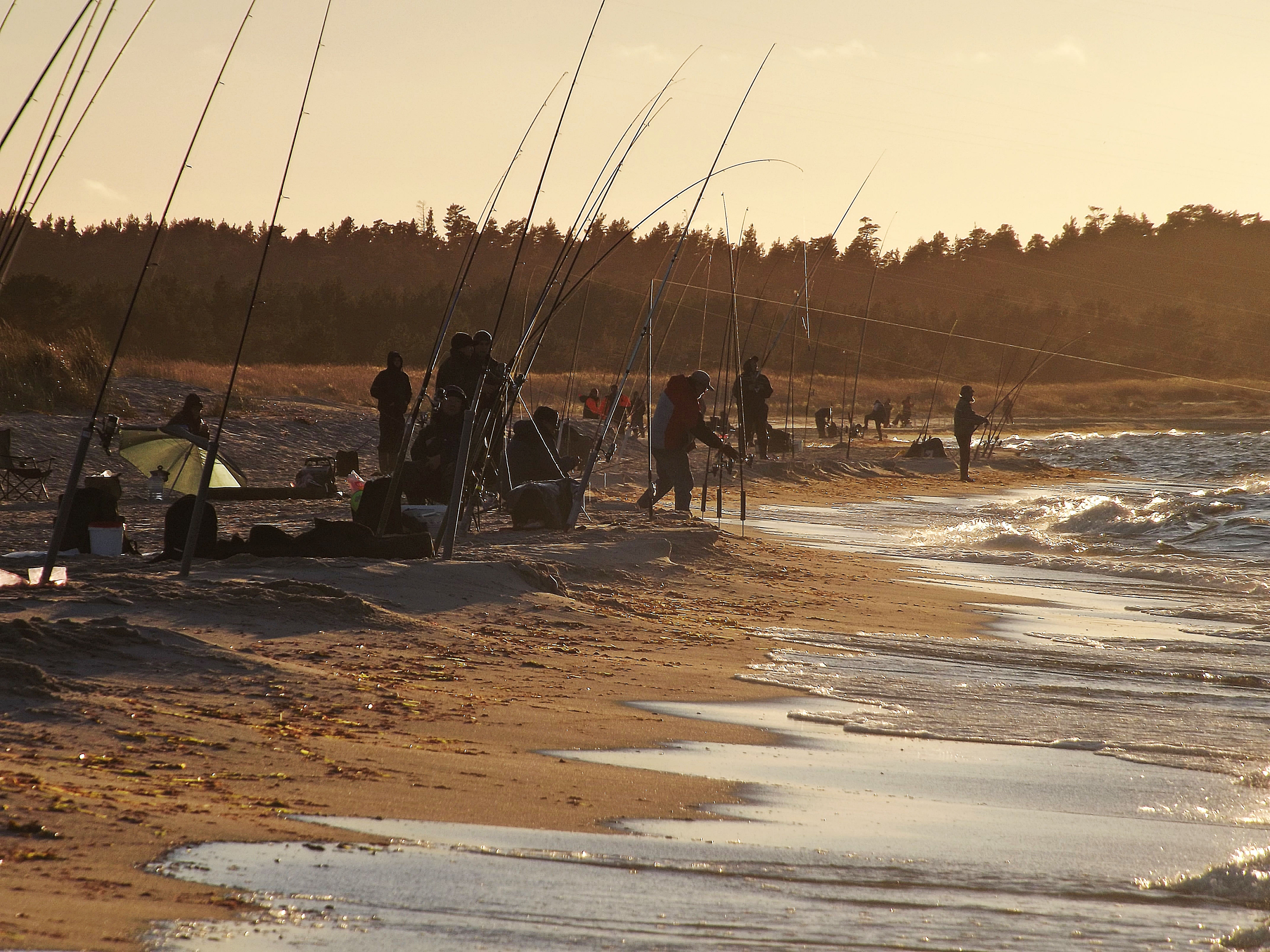 Sügisene lestapüük